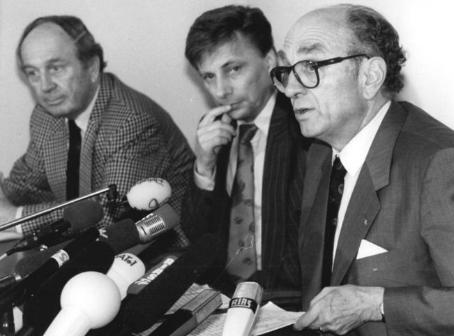 ADN-Bernd Settnik-15.10.90-wü Berlin: Pressekonferenz- Nach der Tagung des FDP-Präsidiums stellten sich FDP-Vorsitzender Otto Graf Lambsdorff, sein Stellvertreter Dr. Rainer Ortleb und der bayerische FDP-Vorsitzende Josef Grünbeck (v.r.) auf einer Pressekonferenz den Fragen der Journalisten.